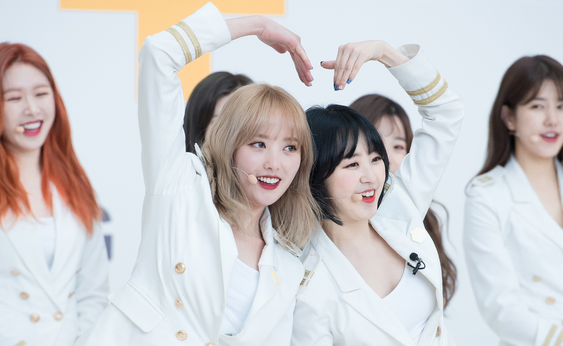 180211 더유닛 유닛G